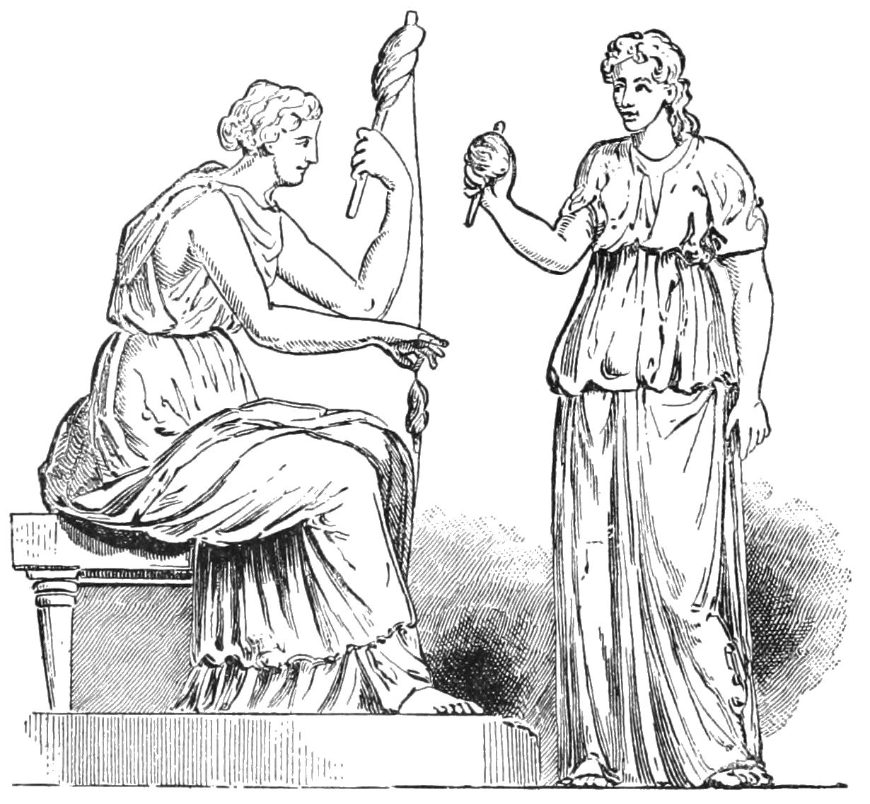 Ancient distaff spinners